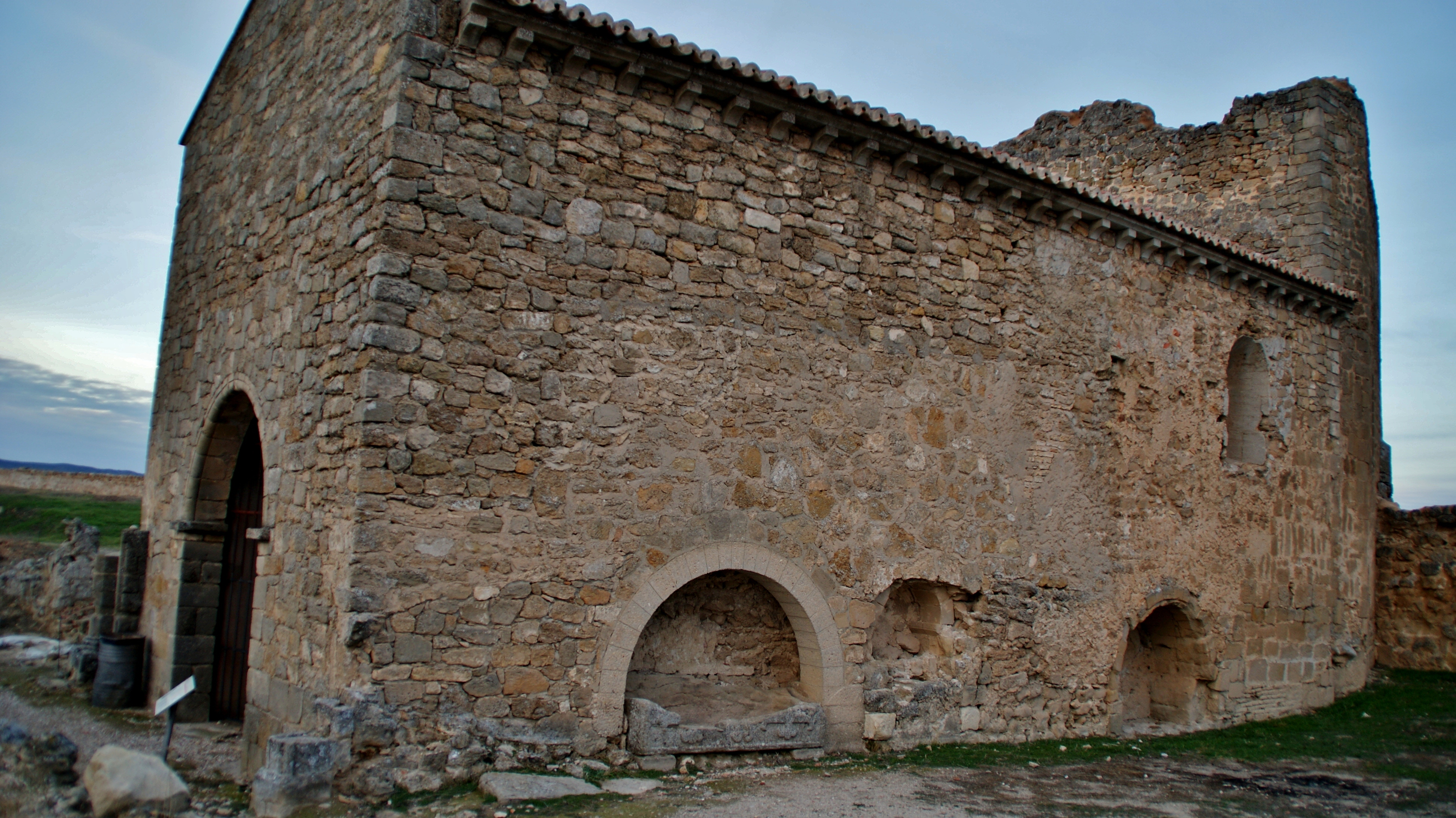 Castillo de Zorita de los Canes, también llamado la "Alcazaba de Zorita", erigido por Mohamed I a útimos del siglo IX, con los materiales extraídos de la cercana ciudad visigoda de Recópolis. Fue cedido por Alfonso VIII a la Orden de Calatrava en 1174. Zorita de los Canes, Guadalajara, Comunidad Autónoma de Castilla-La Mancha.